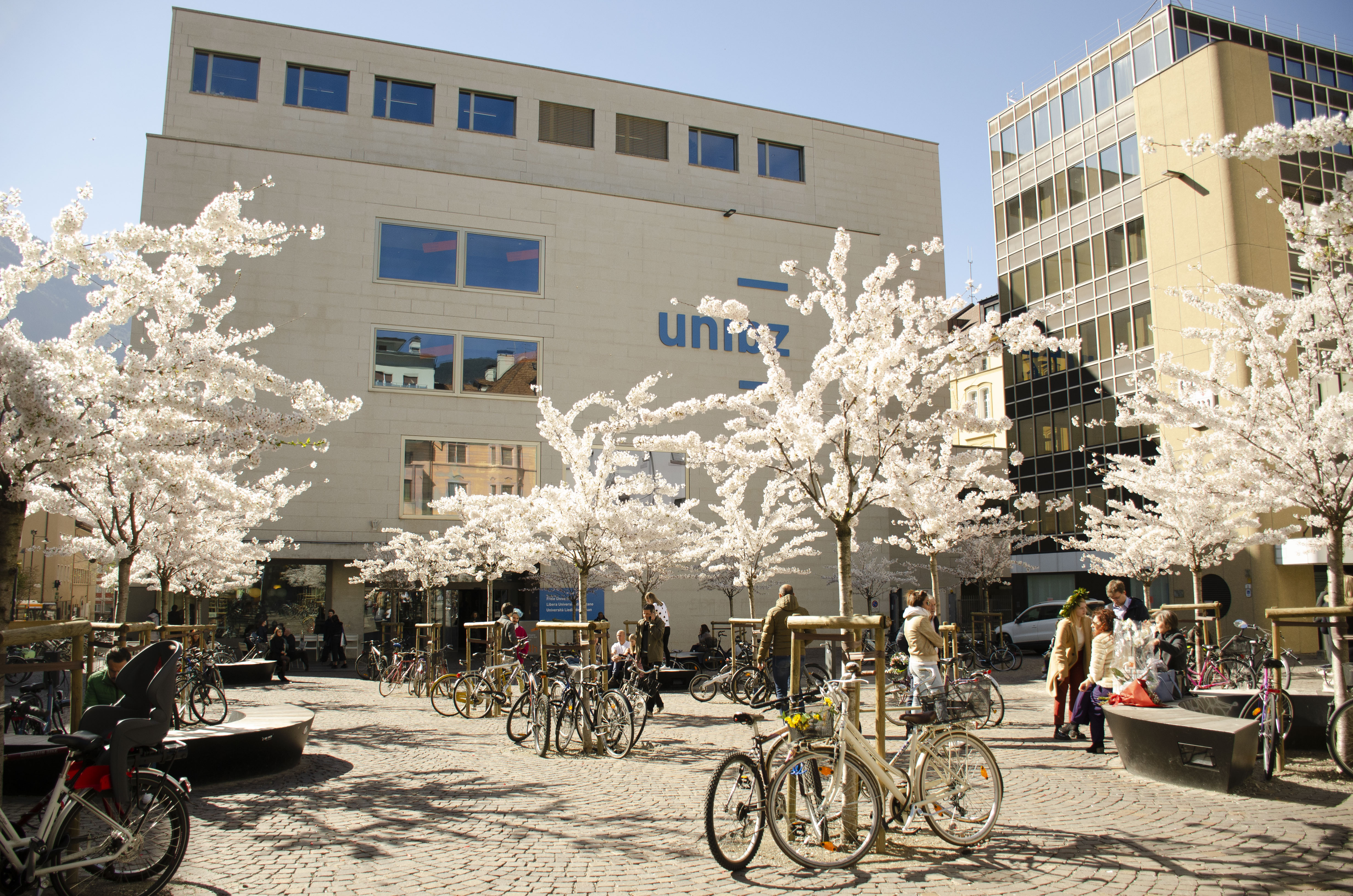 Außenfassade des Universitätsgebäudes in Bozen mit Universitätsplatz